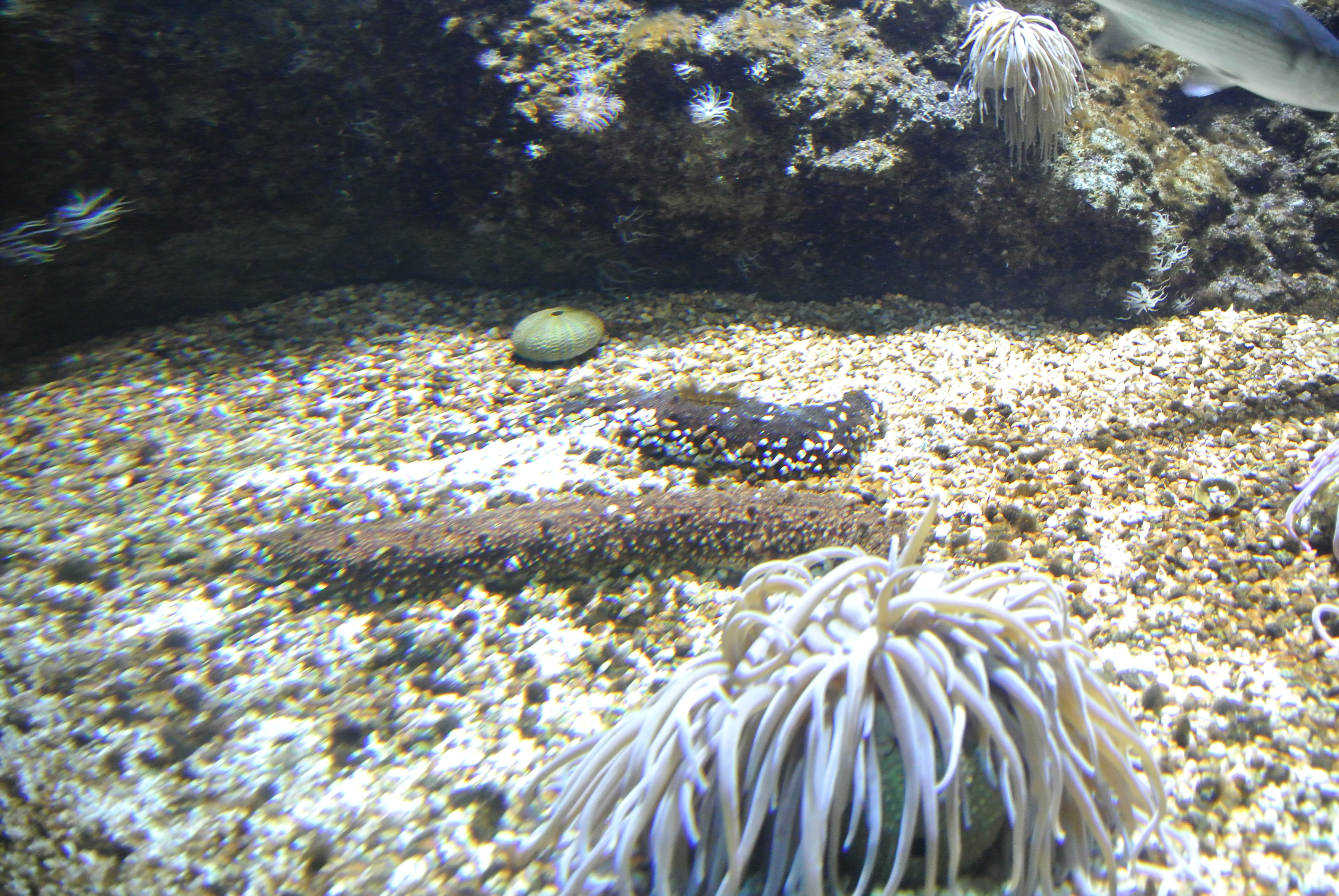 Krétské Cretaquarium 16.7.2014